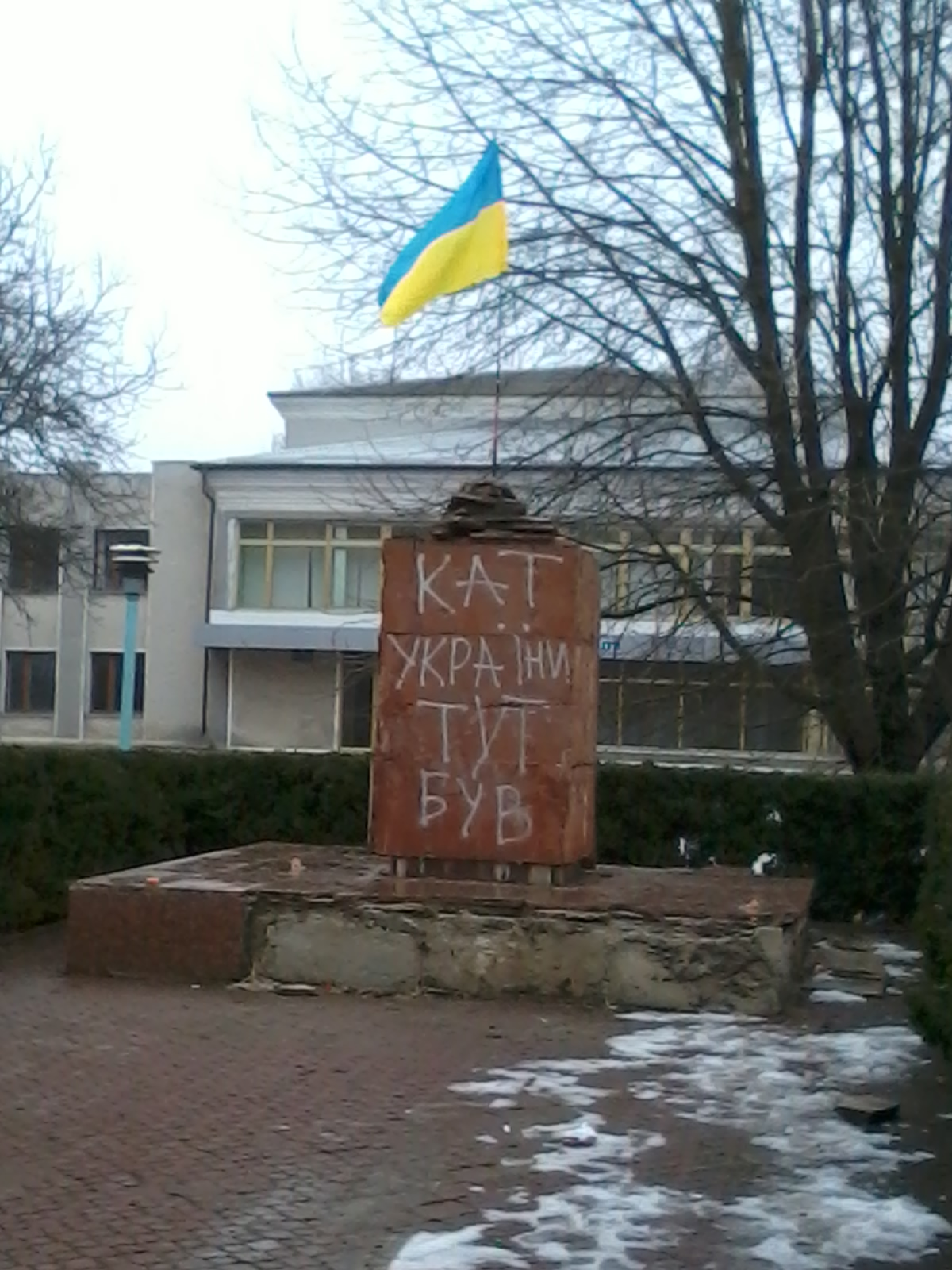 Місце, де був пам*ятник Леніну (Чемерівці)